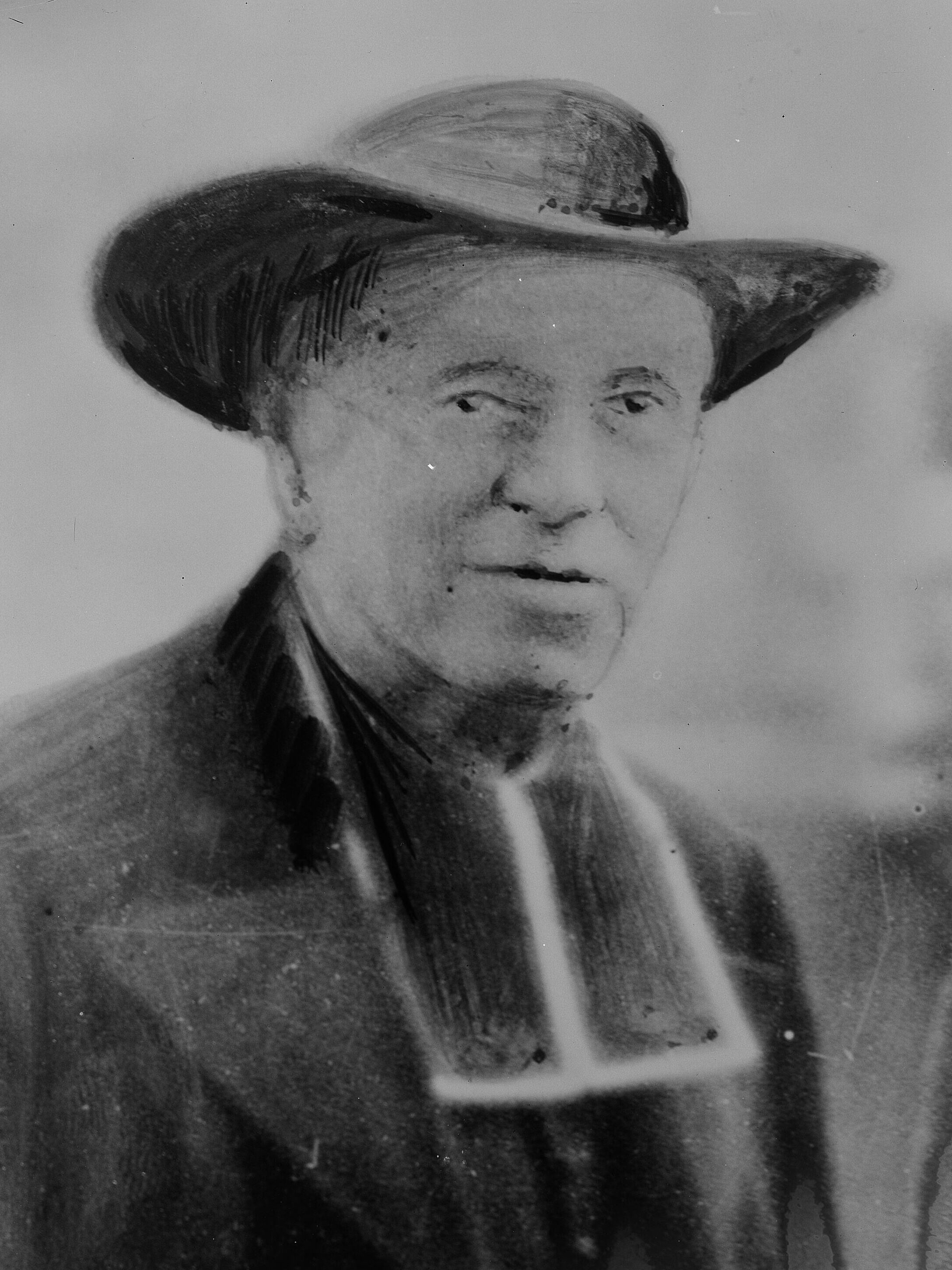 L'abbé [Nicolas] Delsor sénateur [du Bas-Rhin] : photographie de presse